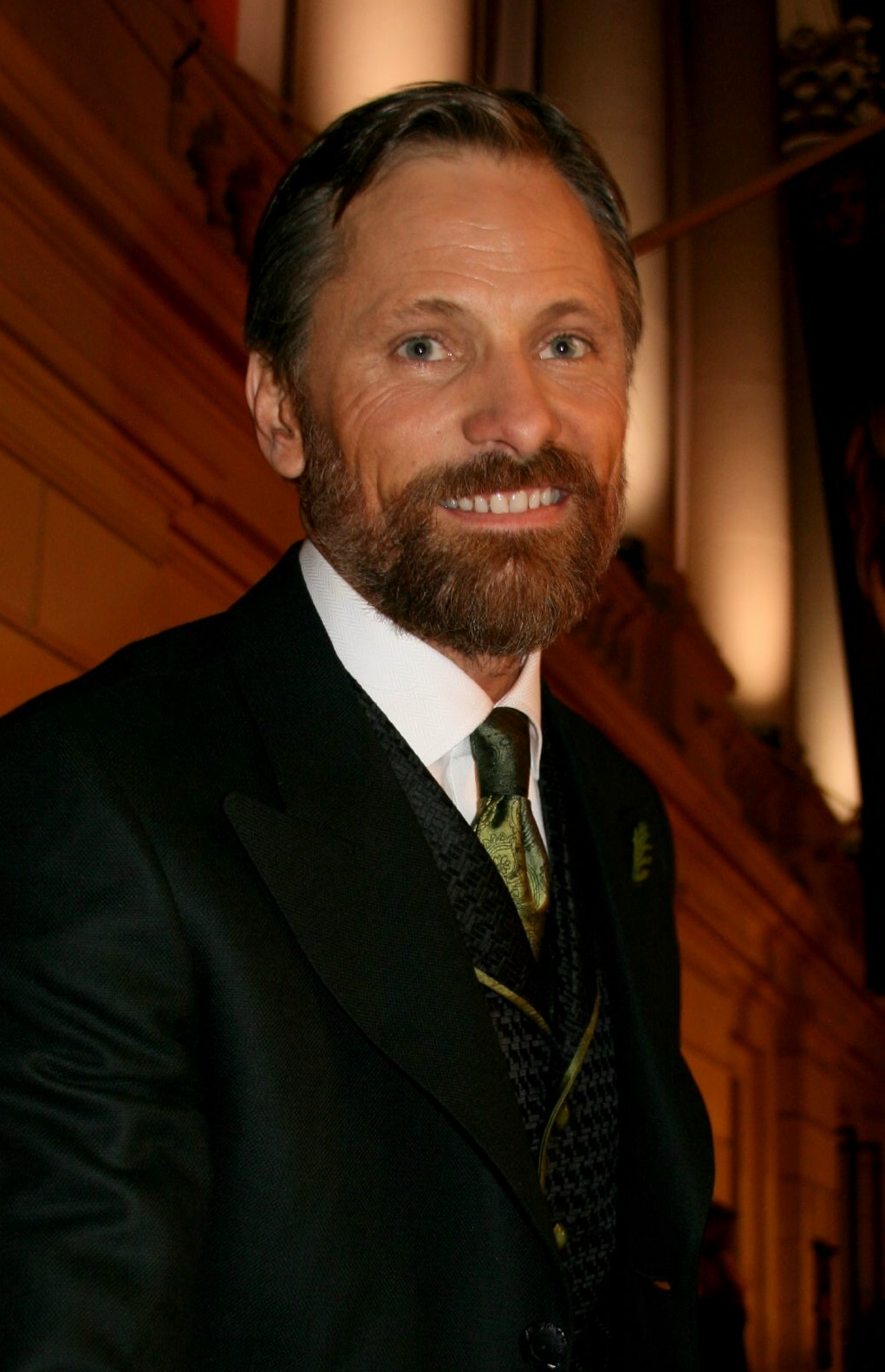 Viggo Mortenson